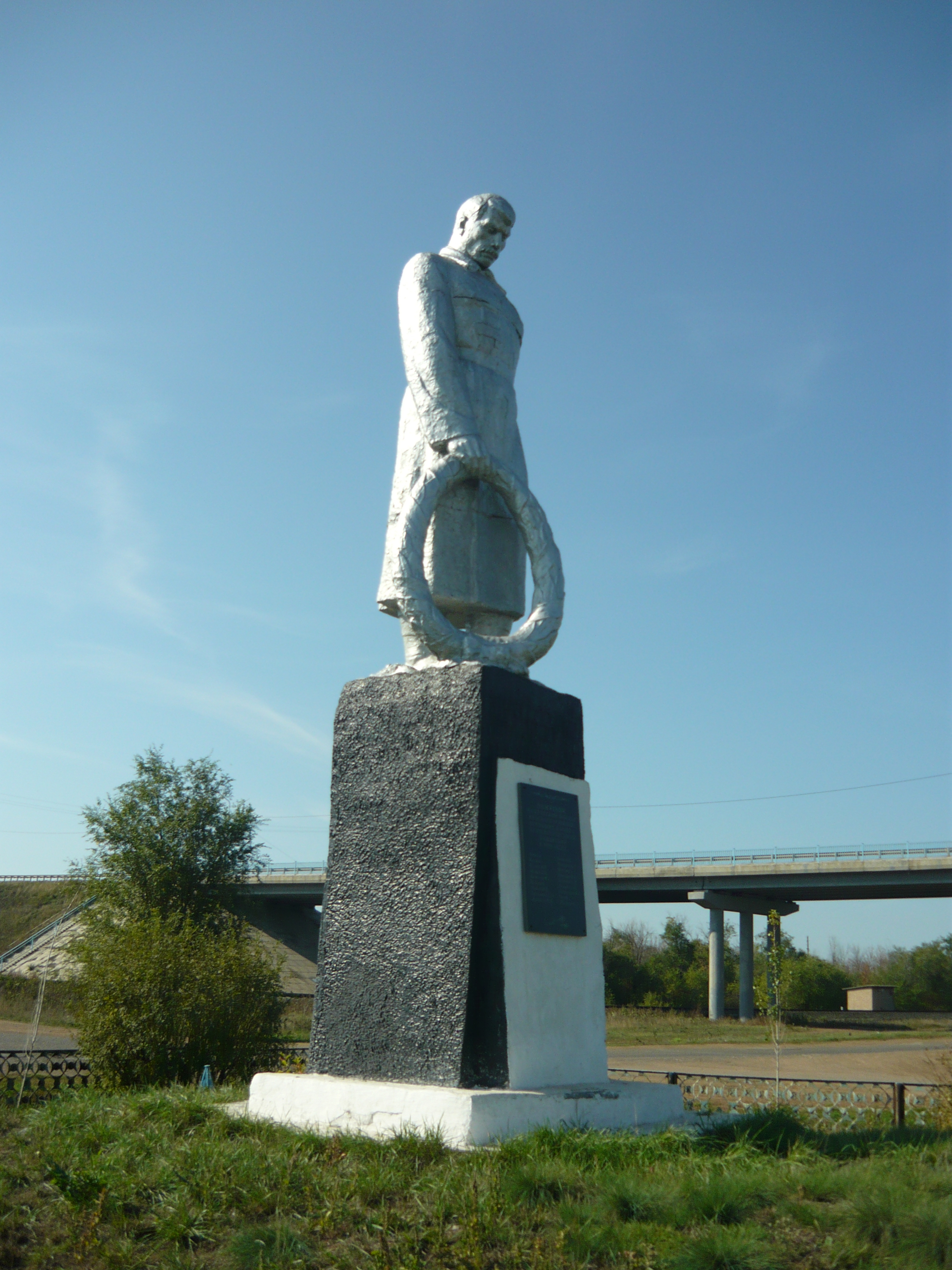 Братская могила красноармейцев, погибших в боях с белогвардейскими бандами: при выезде у ж/д переезда, Тоцкое, Тоцкий район, Оренбургская область